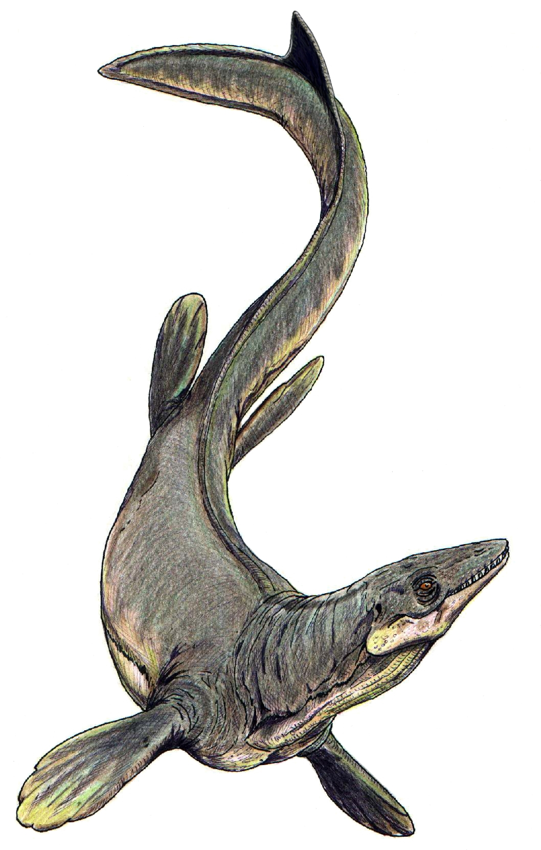 Plioplatecarpus, autor - Bogdanov,2006